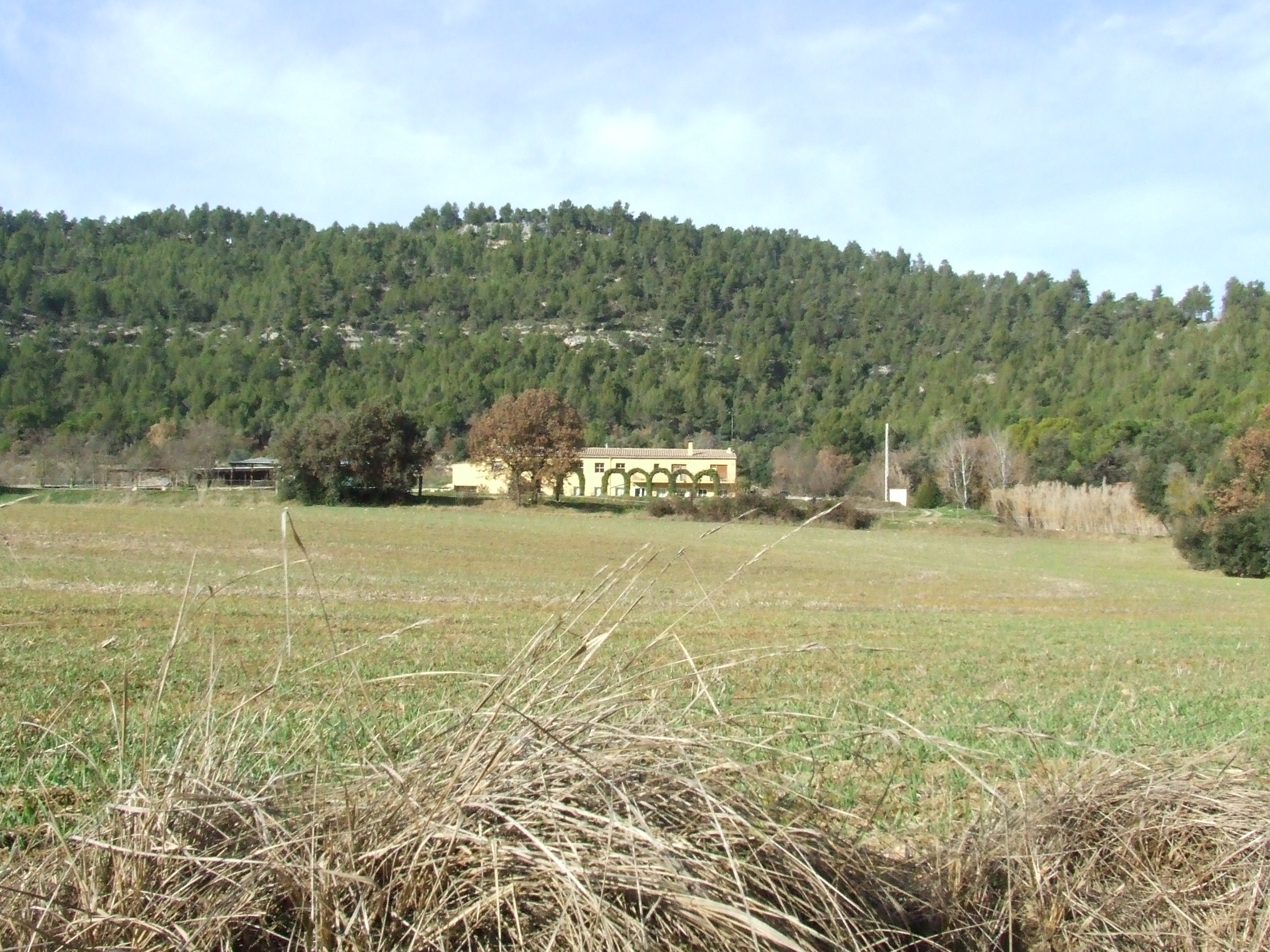 Malniu (Calders, Moianès)